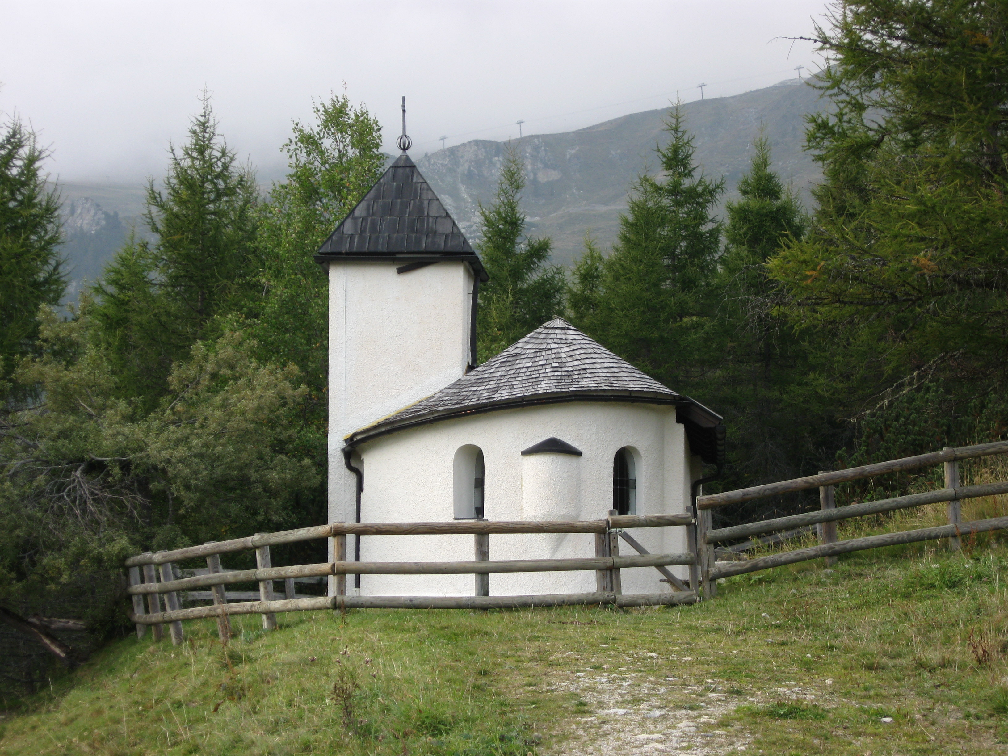 Die Barbarakapelle, nahe der Schrofenalm auf dem Areal des aufgelassenen Magnesitbergwerkes Tux. This media shows the remarkable cultural object in the Austrian state of Tyrol listed by the Tyrolean Art Cadastre with the ID 18481. (on tirisMaps, pdf, more images on Commons, Wikidata)